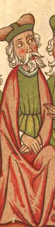 Kazimierz I